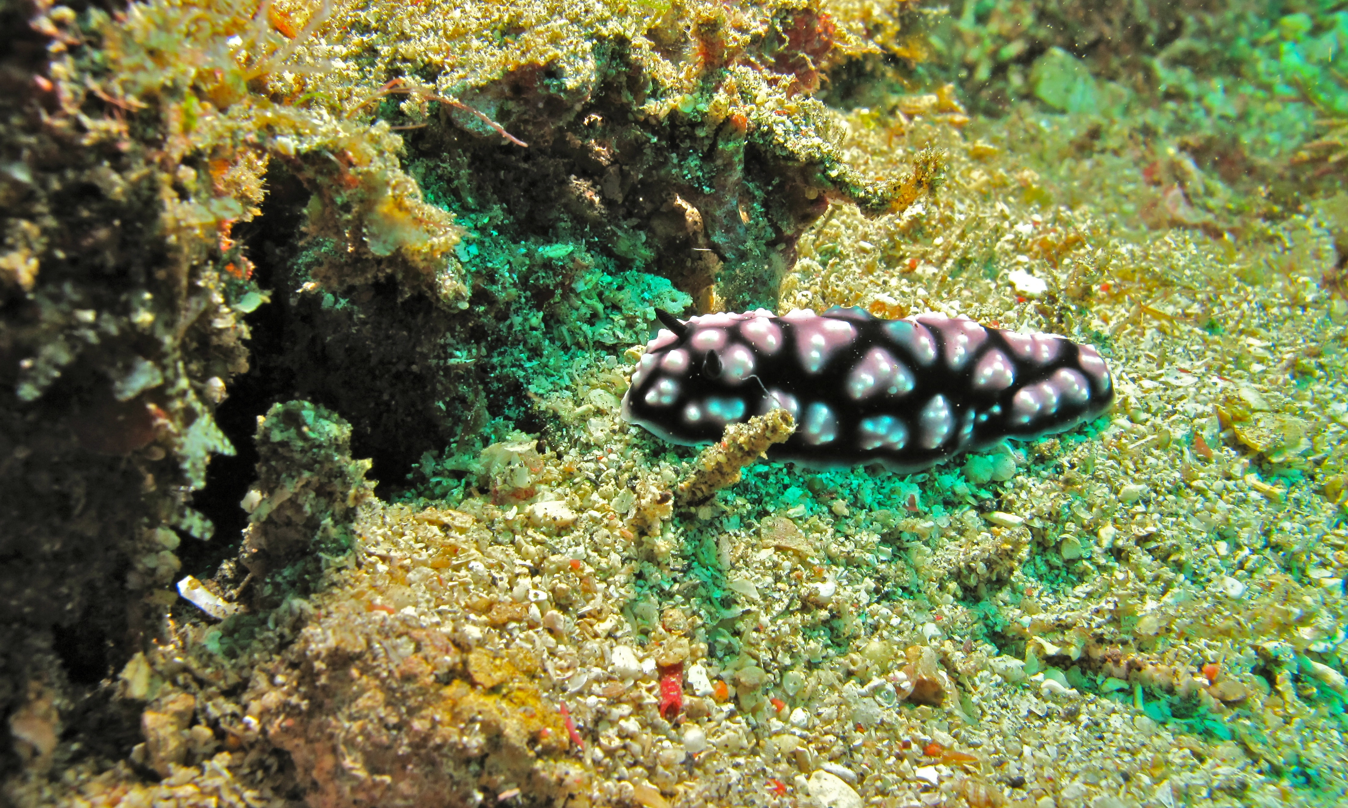 Nudi retreat II, Lembeh Strait, Sulawesi, INDONESIA